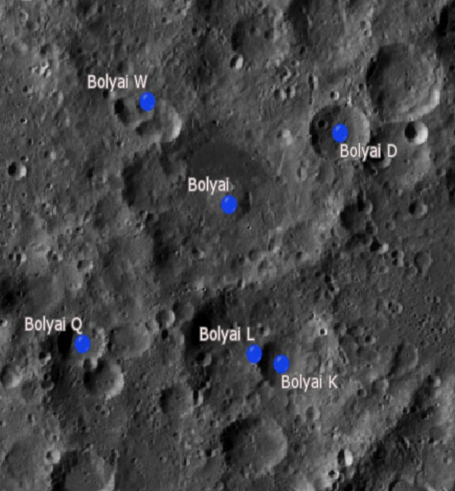 Cráter lunar Bolyai. Cráteres satélite. (Imagen LRO)